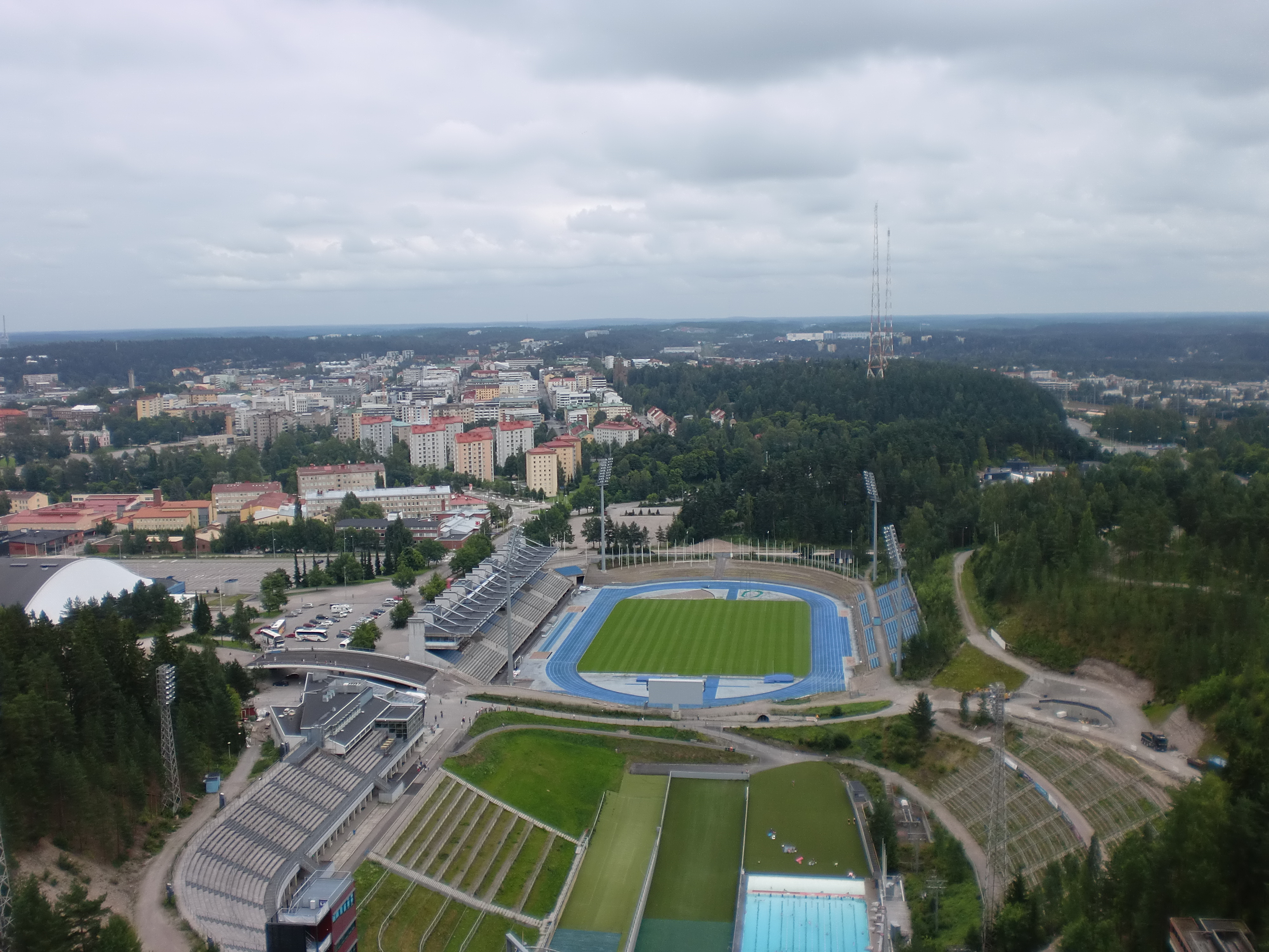 Lahden stadion; hiihtostadion Lahdessa This is a photo of a monument in Finland identified by the ID 'Lahti Stadium' (Q952432) - RKY: 1902